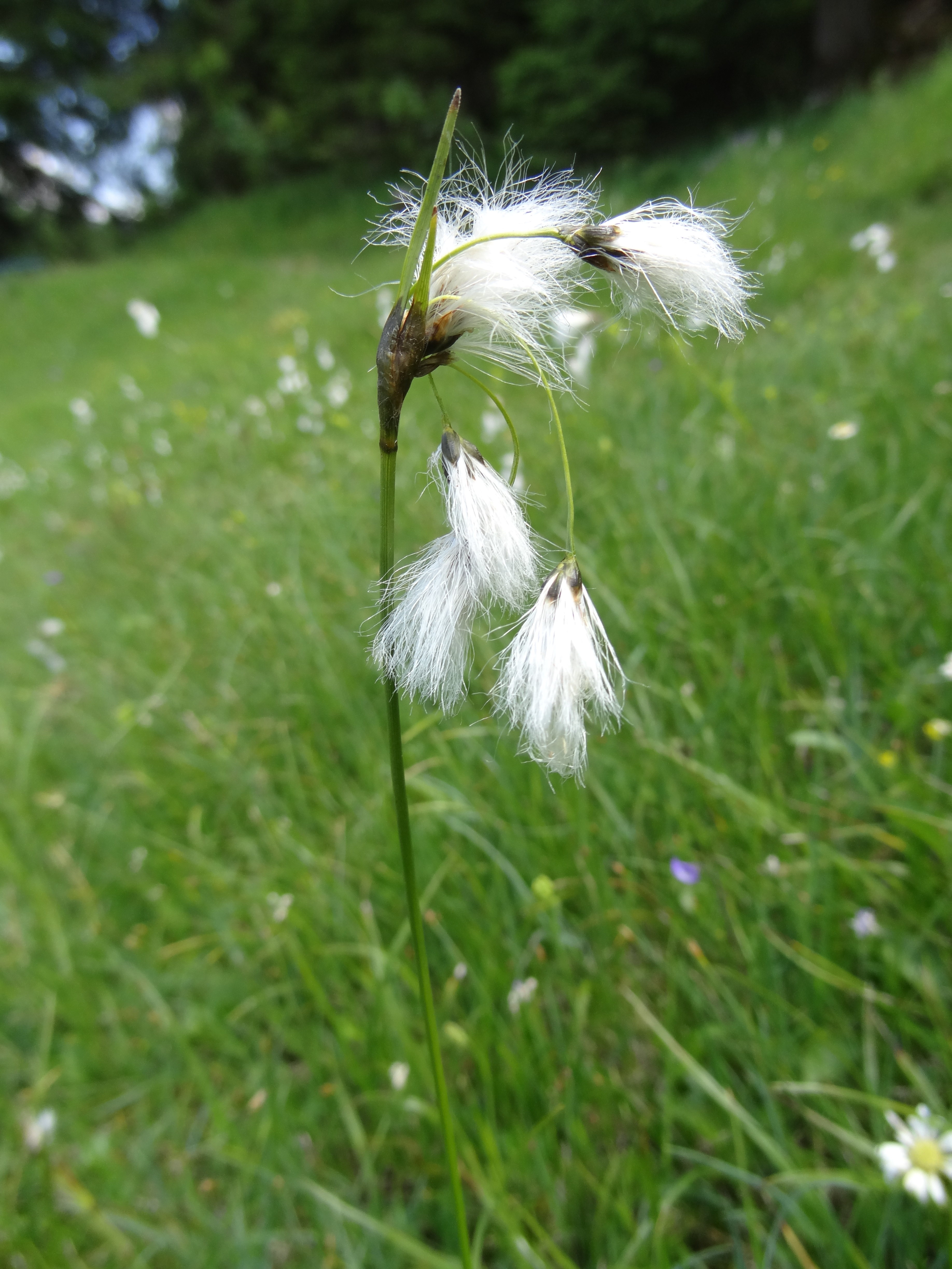 Cyperaceae, Schmalblättriges Wollgras, Österreich, Vorarlberg, Riezlern, 1100 m Photo: U.Schmidt, 18.VI.2012